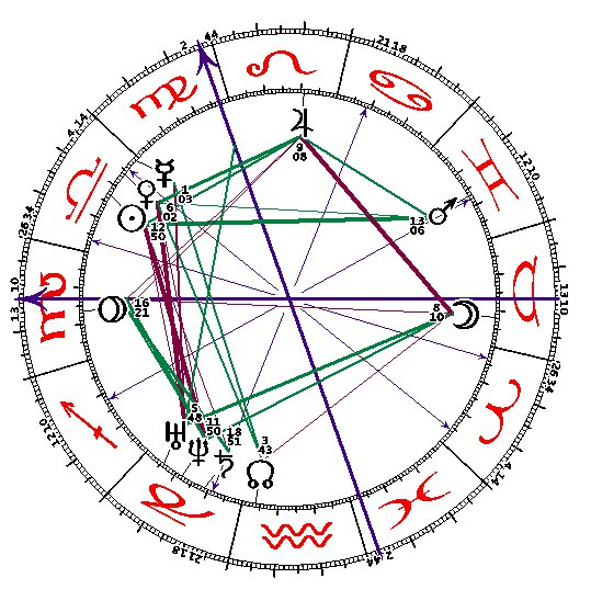 Radix horoskop tegning